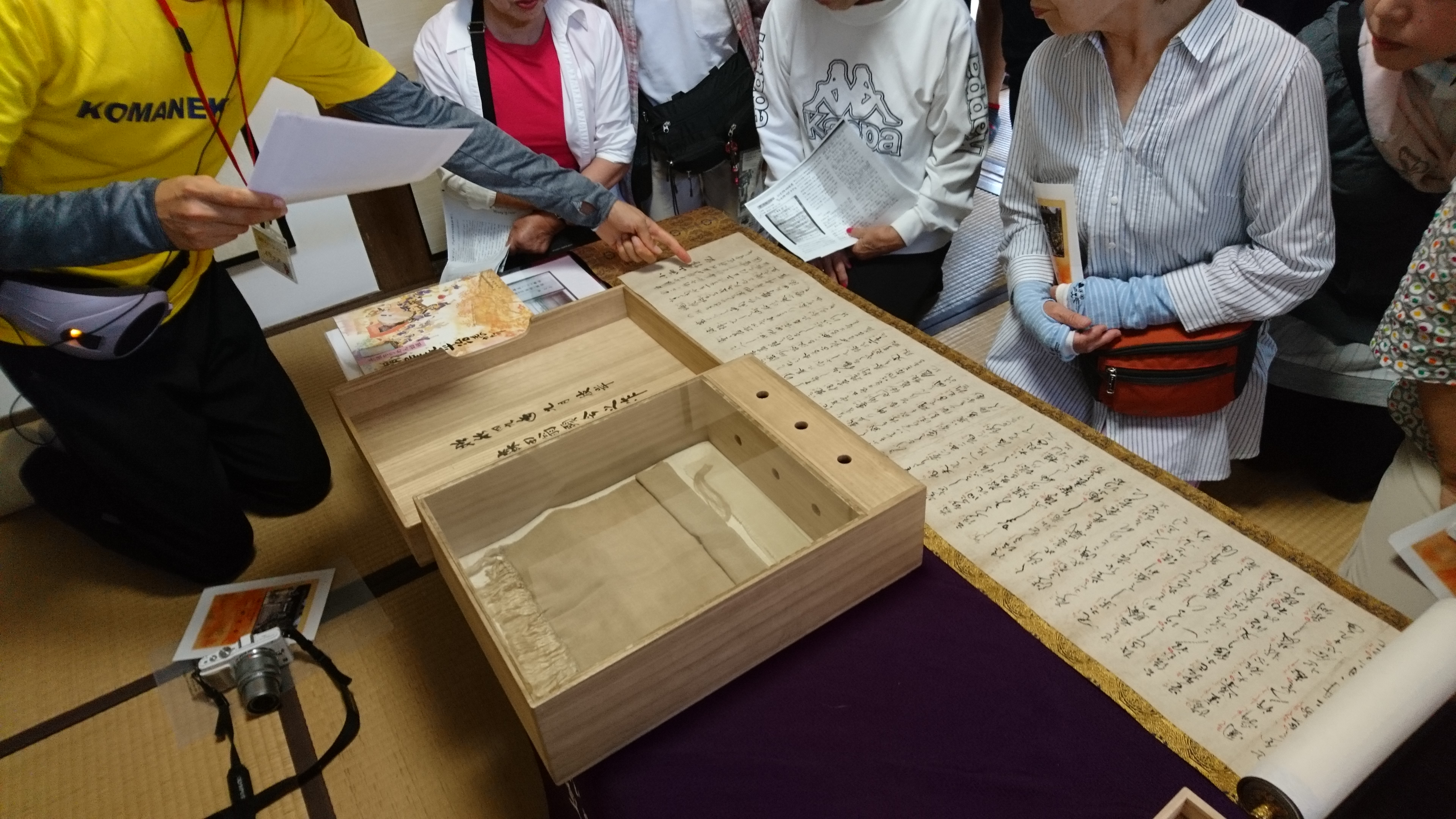 こまねこウォーク禅定寺にて